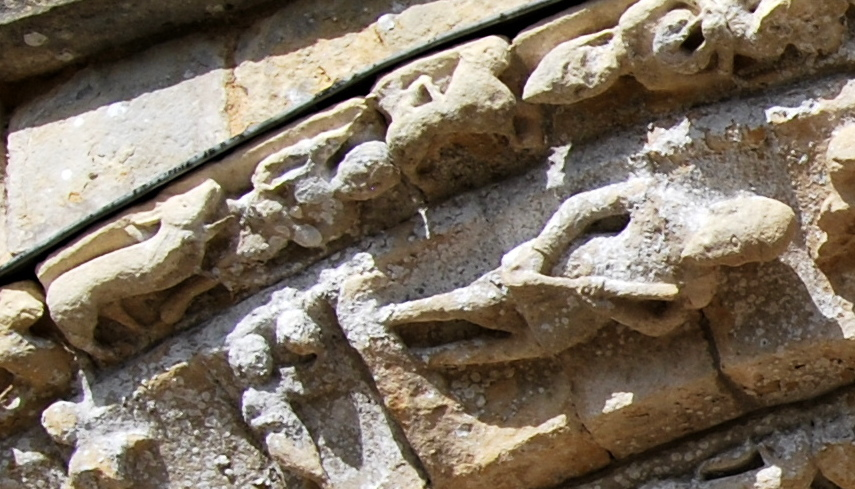 Détails du Zodiaque du Portail